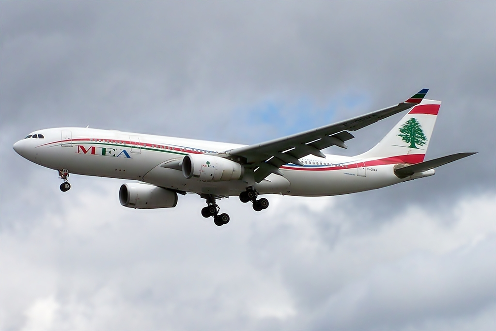 F-orma a330 mea